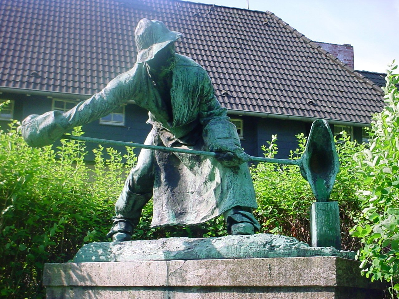 Der Gießer (ist's Wilkinus?)